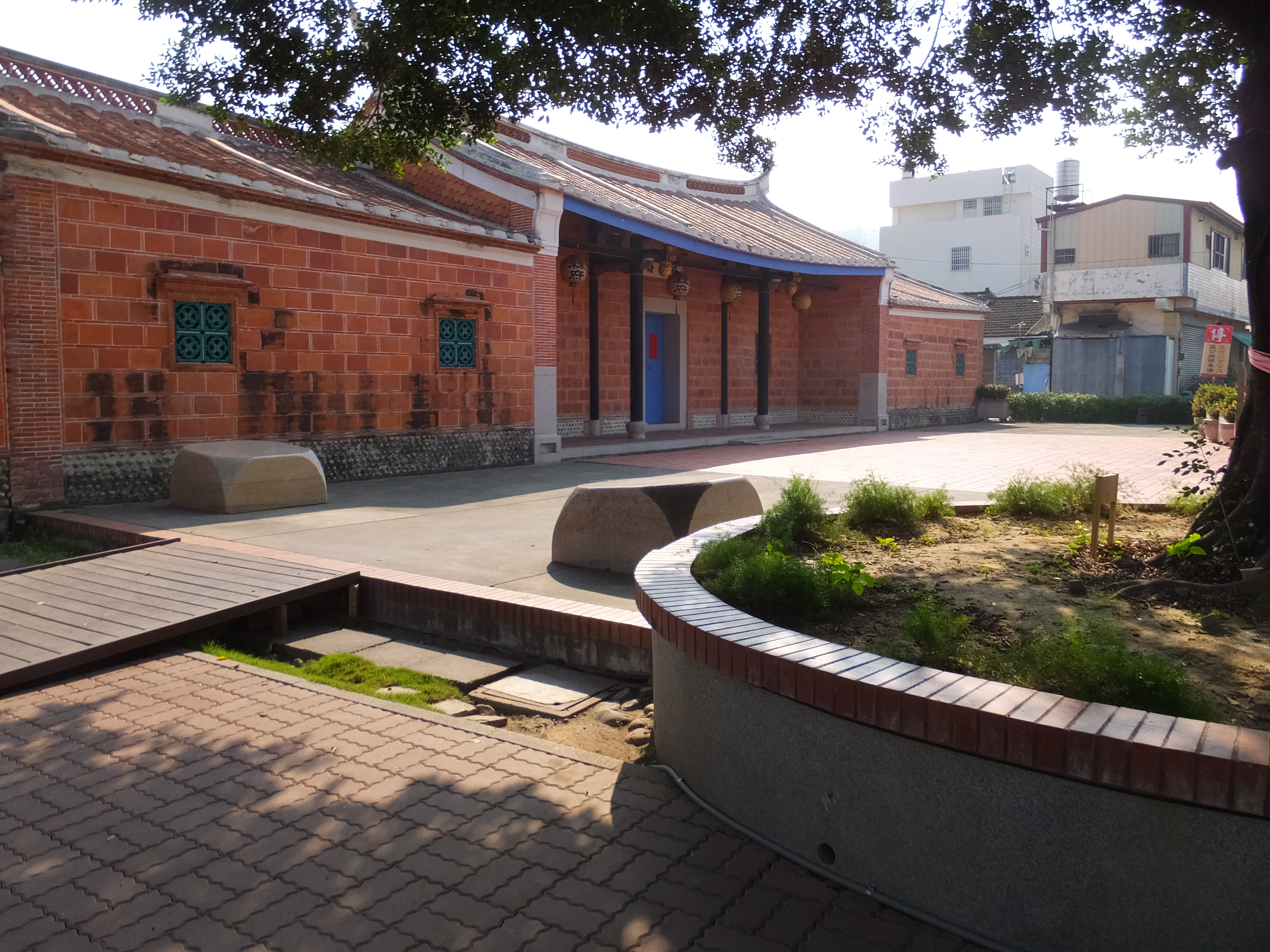 霧峰林家宮保第園區 Wufeng Lin Family Gongbaodi Park